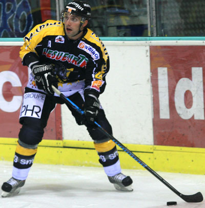 Marc-André Thinel, lors du match des champions à Grenoble (perdu par Rouen contre Grenoble 1-3)